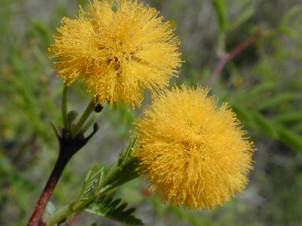 Acacia farnesiana photo de Hawaiian Ecosystems at Risk Project libre de droits